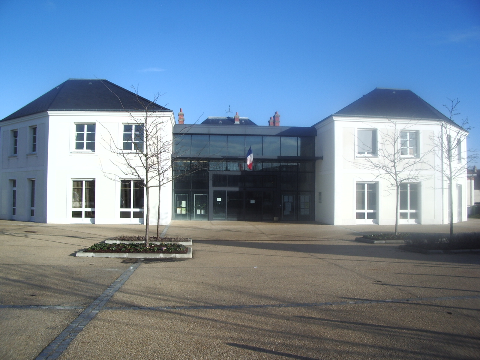 mairie de Cesson